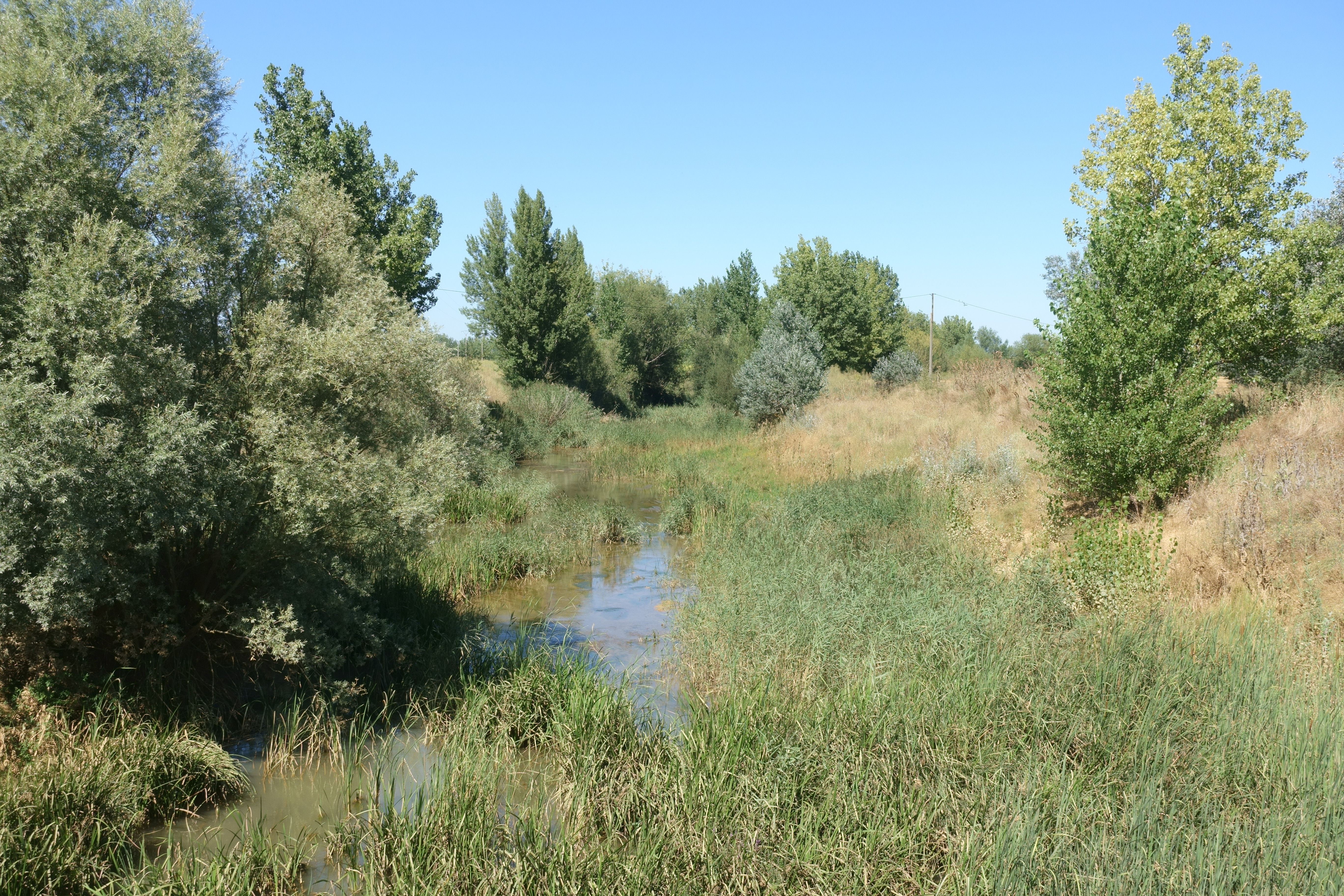 Río Valderaduey a su paso por Santervás de Campos (Valladolid, España).